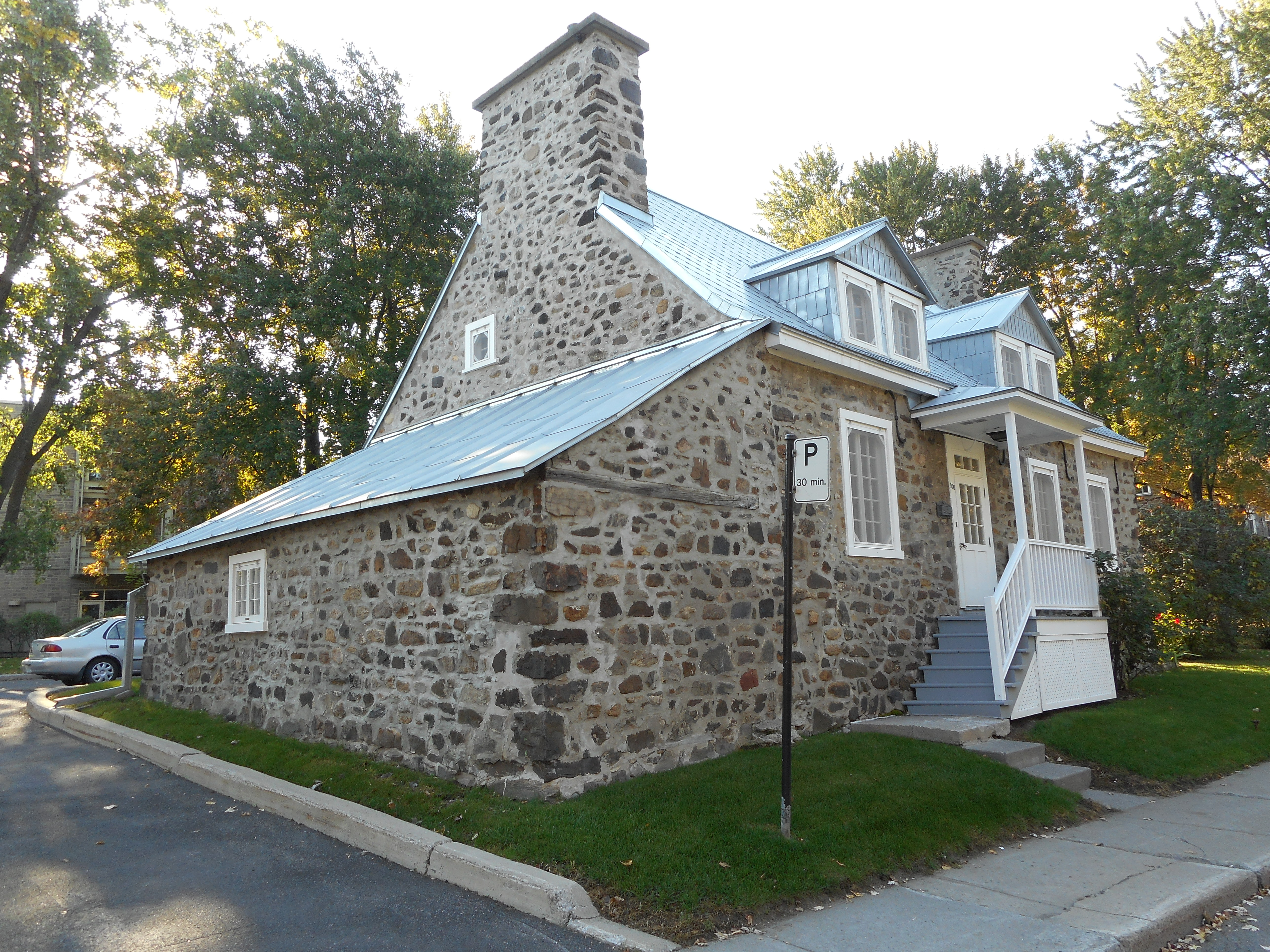 Maison Daniel-Poirier, 100, rue Saint-Charles Est, Longueuil, Québec marigot.ca